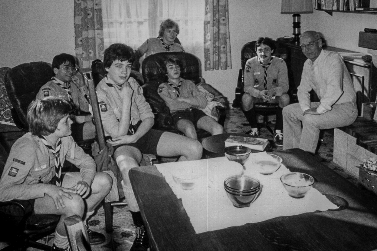 Michel Menu en avril 1983 Michel Menu, né le 3 février 1916 à Secondigny (Deux-Sèvres), et mort le 2 mars 2015 (à 99 ans), est un résistant, ingénieur et auteur français. Figure majeure du scoutisme catholique, il est le fondateur des Raiders scouts et de raids spirituels, les « Goums ».